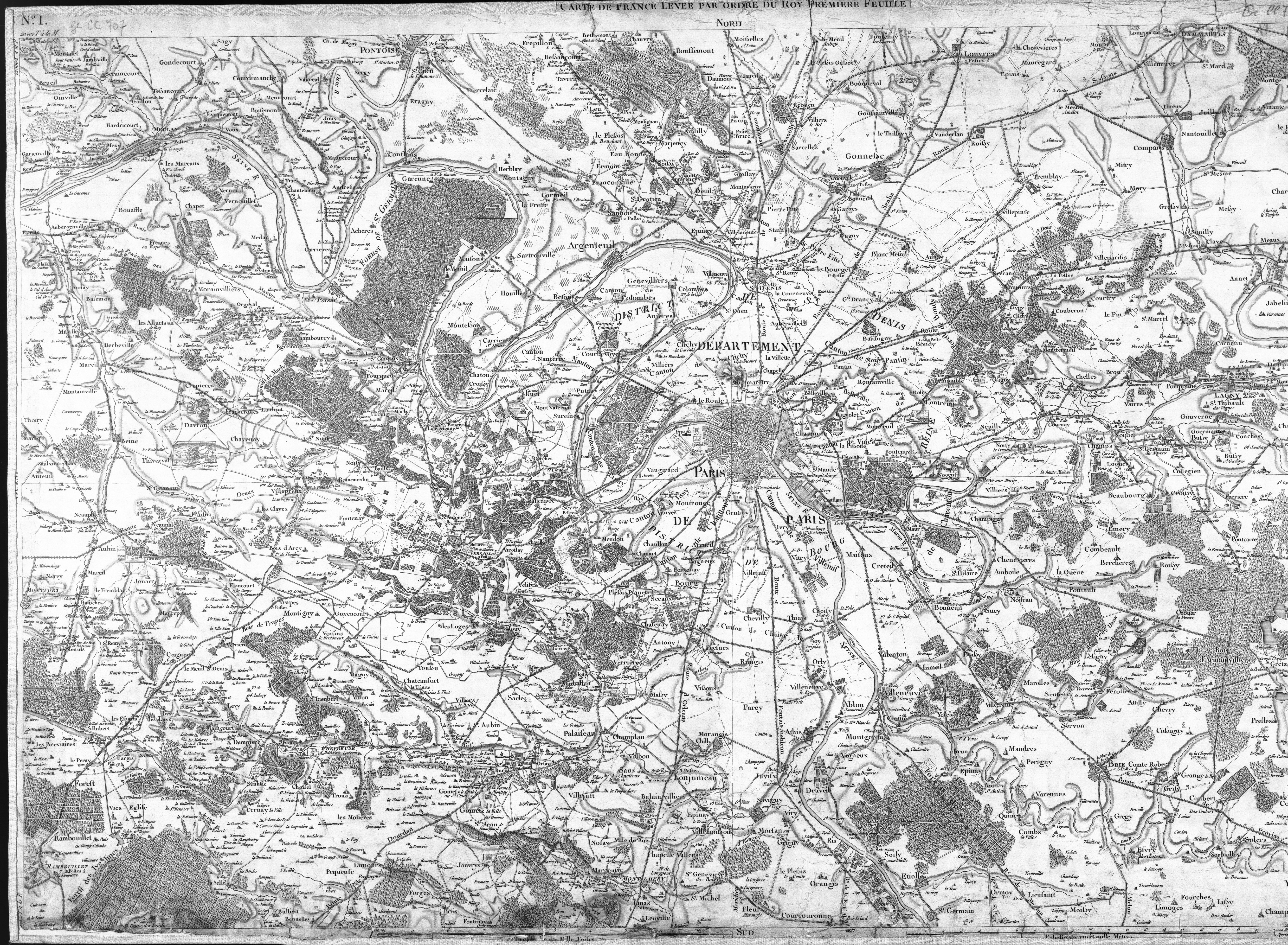 Map of the suburbs of Paris Type : image fixe, monographie Titre(s) : Paris. Nouv. éd. N °1 [Image fixe numérisée] / R. Brunet fecit. Ecrit par Bourgoin Publication : [S.l.] : [s.n.], [s.d.] Imprimeur / Fabricant : [Paris : Observatoire puis Dépôt de la Guerre entre 1756 et 1815], [ca 1815] Description matérielle : 1 carte ; 59,5 x 92 cm Collection : [Carte de France / établie sous la direction de César-François Cassini de Thury] ; 001 Note(s) : Cote : Ge CC 707 (7 H) BNF Richelieu Cartes et Plans Reprod. Sc 88/573 Sujet(s) : France Notice n° : FRBNF38639065